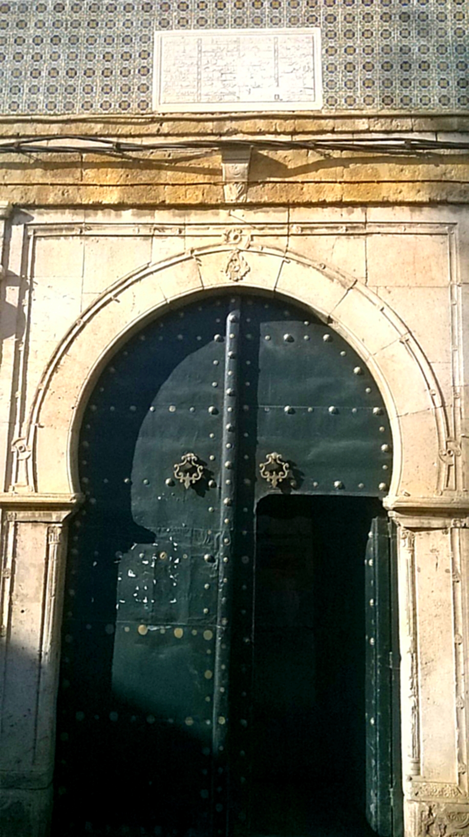 Porte d'entrée de la mosquée Sidi El Ansari , El Kaadine , Bab Souika , la médina de Tunis